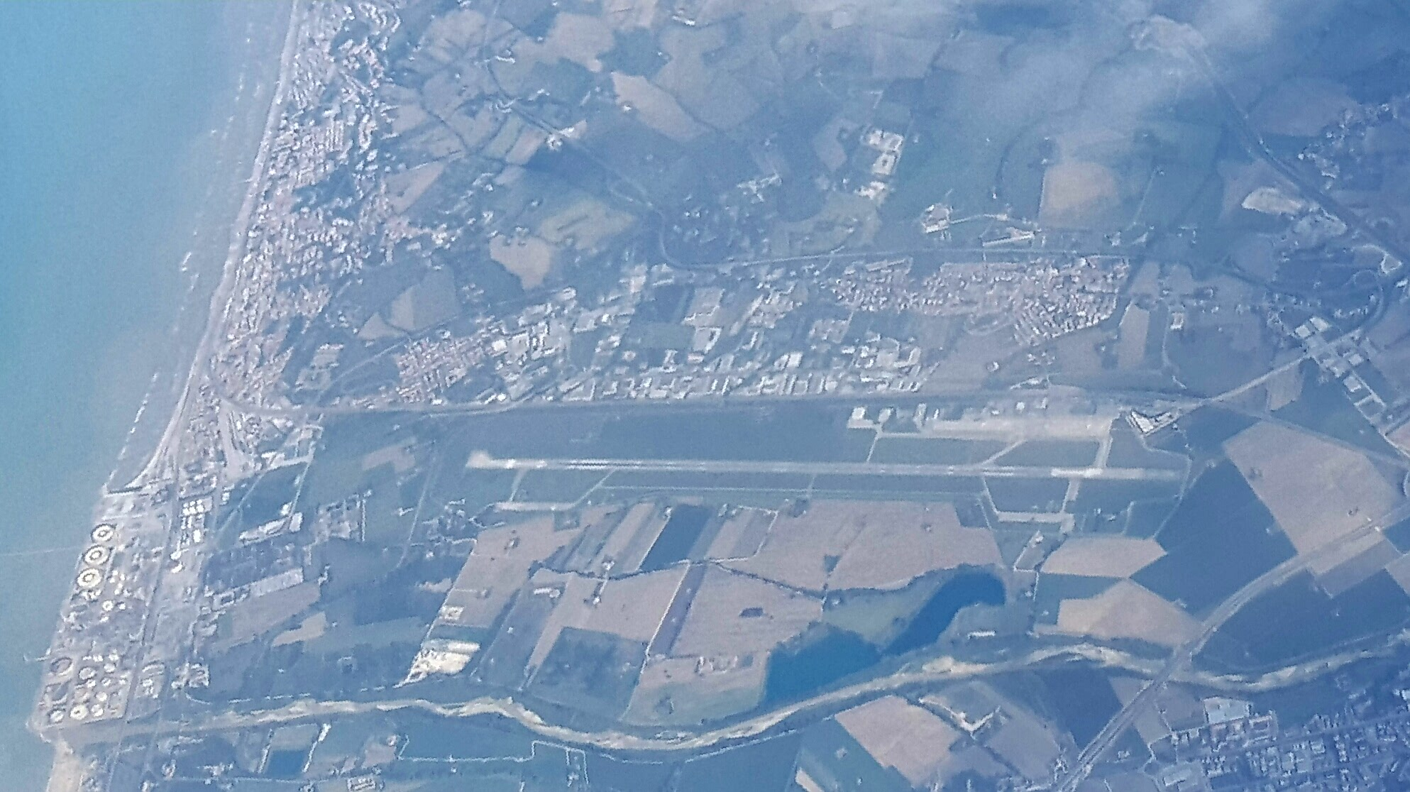 Aeroporto di Ancona-Raffaello Sanzio visto in volo.